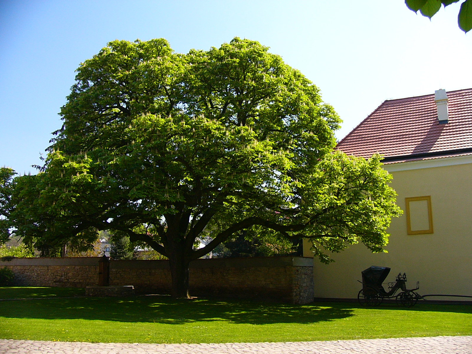 Lípa u Tvrze Třebotov